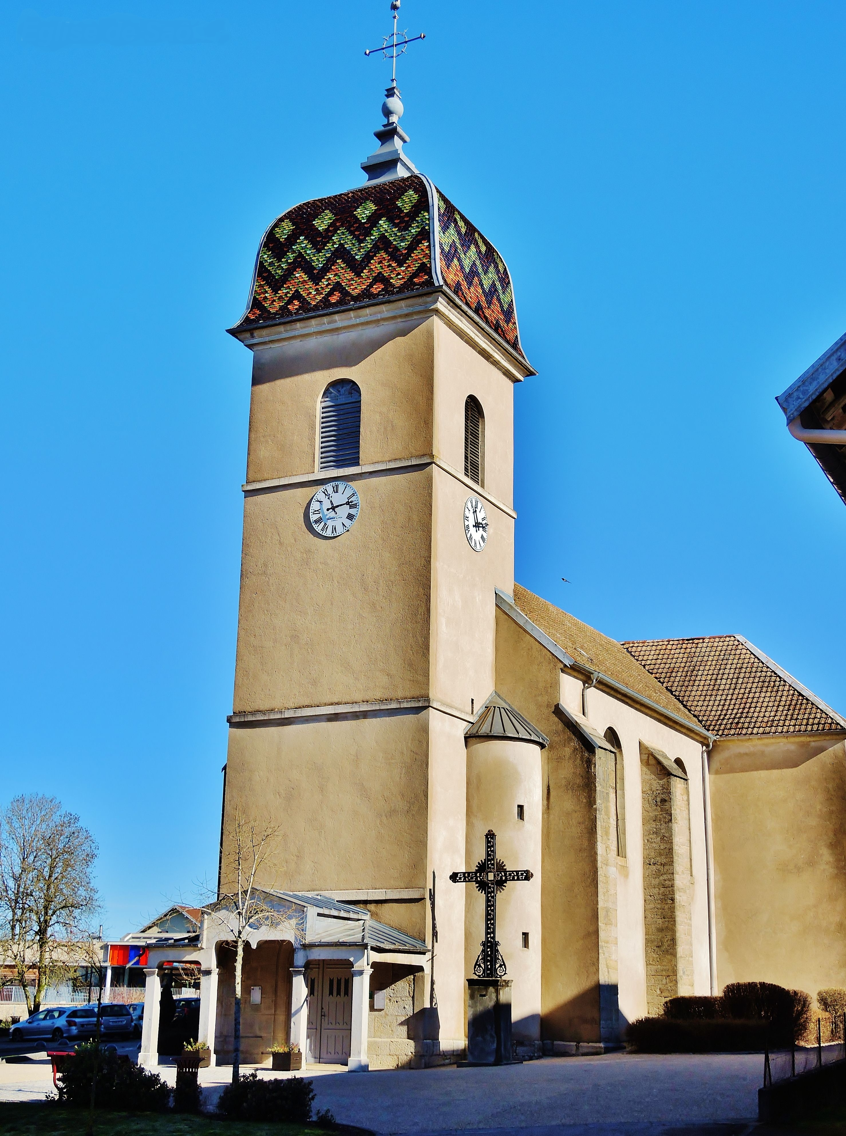 Eglise du village de Saône. Doubs